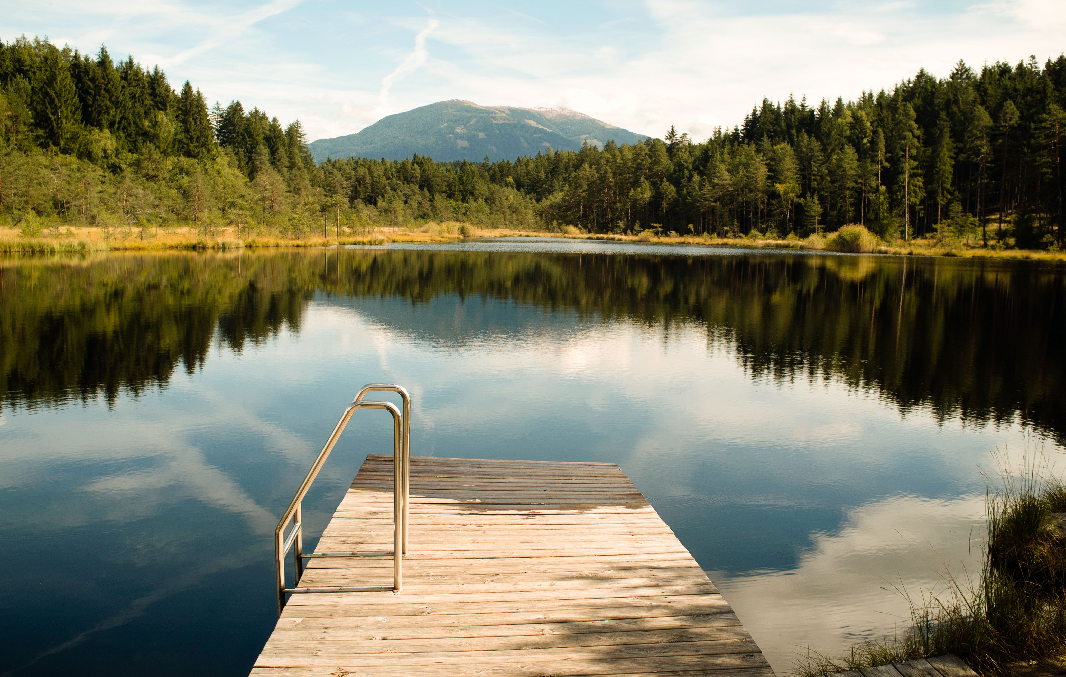 Egelsee This media shows the nature reserve in Carinthia with the ID NSG.037.